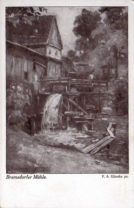 Postkarte: "Bremsdorfer Mühle. F. A. Glienke px." Sommerfrische Bremsdorfer Mühle. Post Fünfeichen, Stat. Grunow, Lausitz